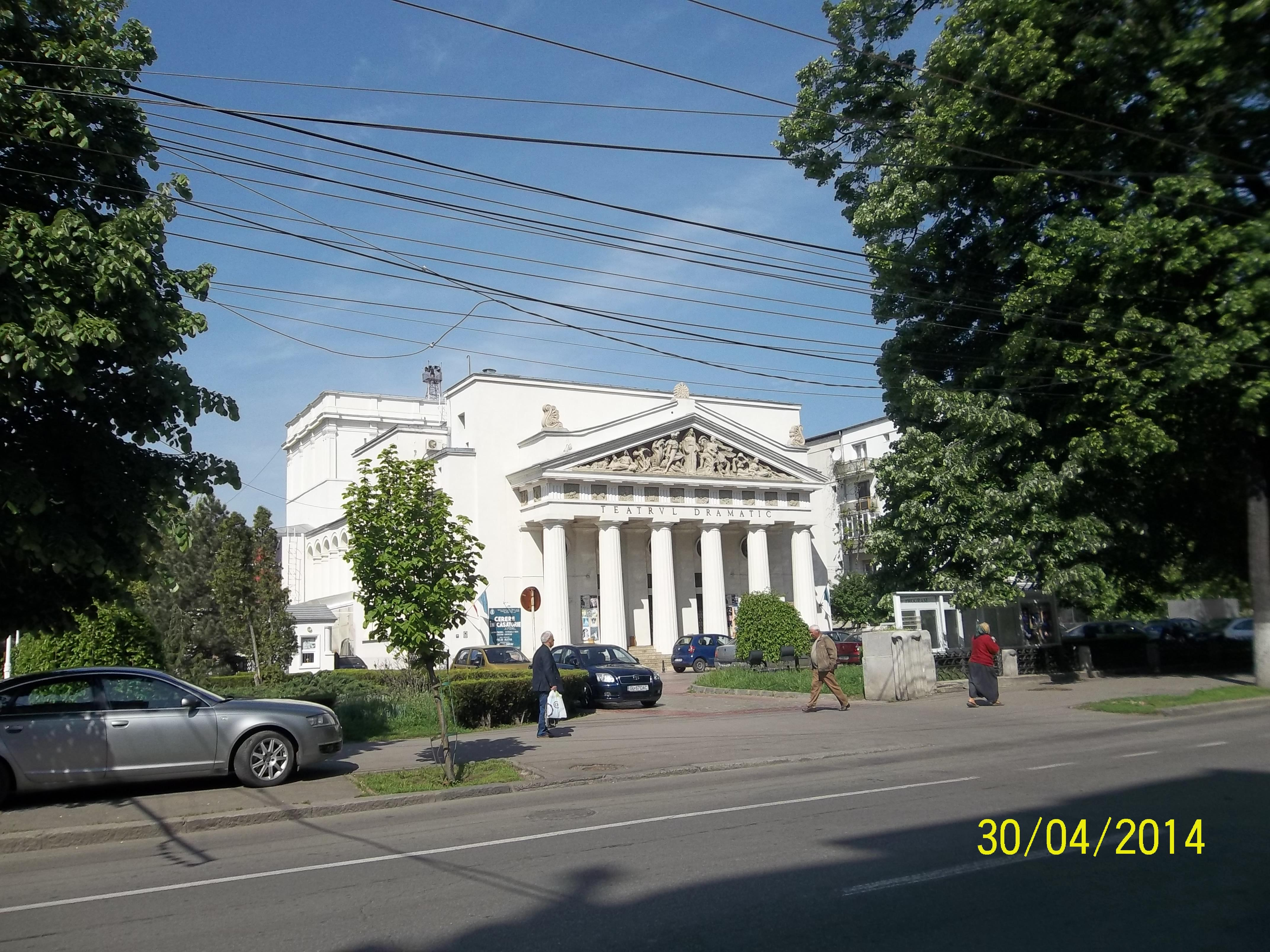 "Dramatic Theatre, Galatz, Romania"